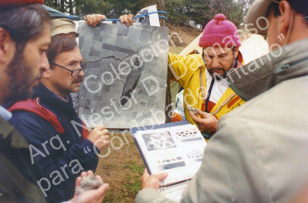 Livio Incatasciato 09 AVACA RIO IV-1P